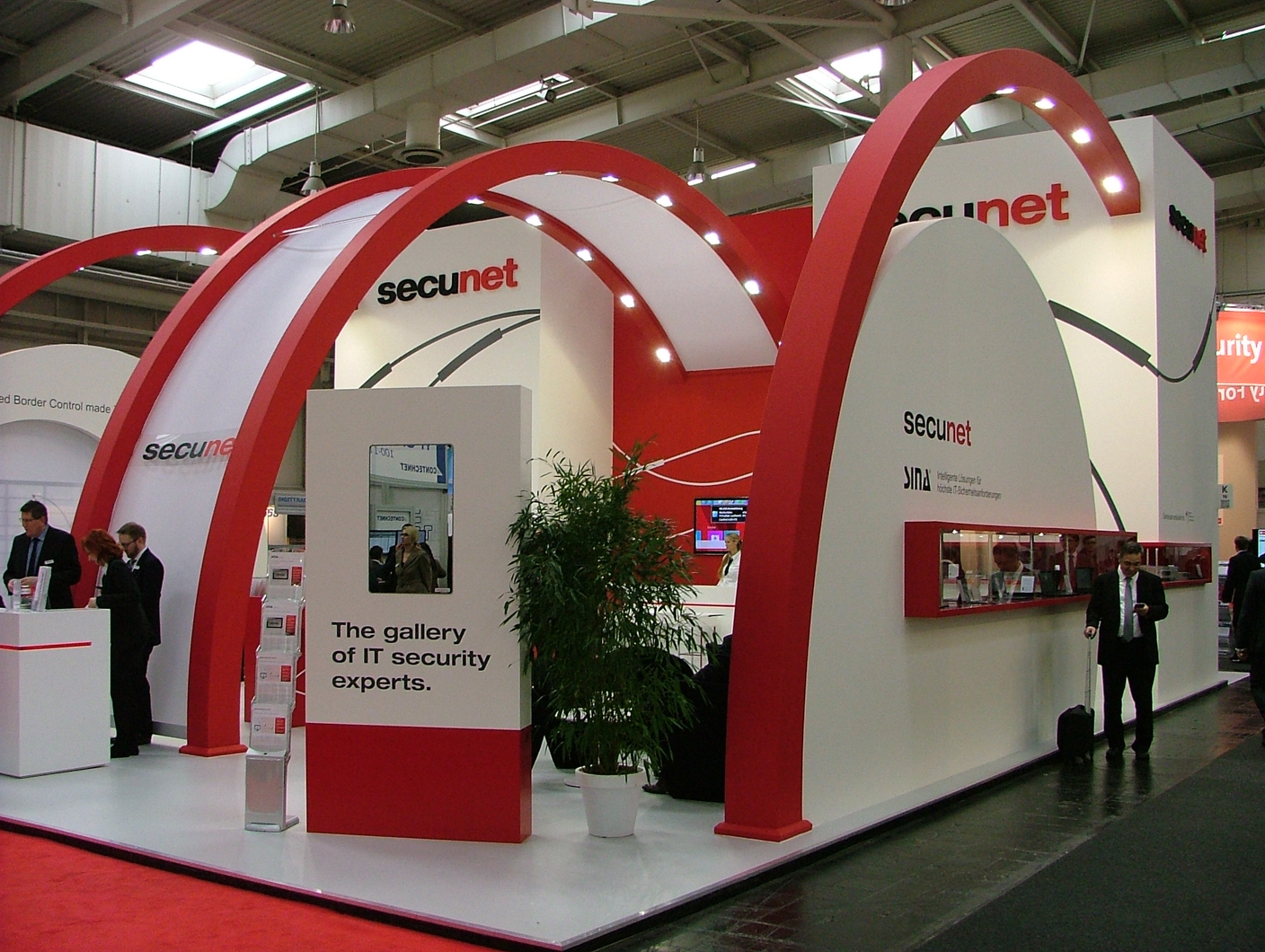 CeBIT 2015 in Hannover